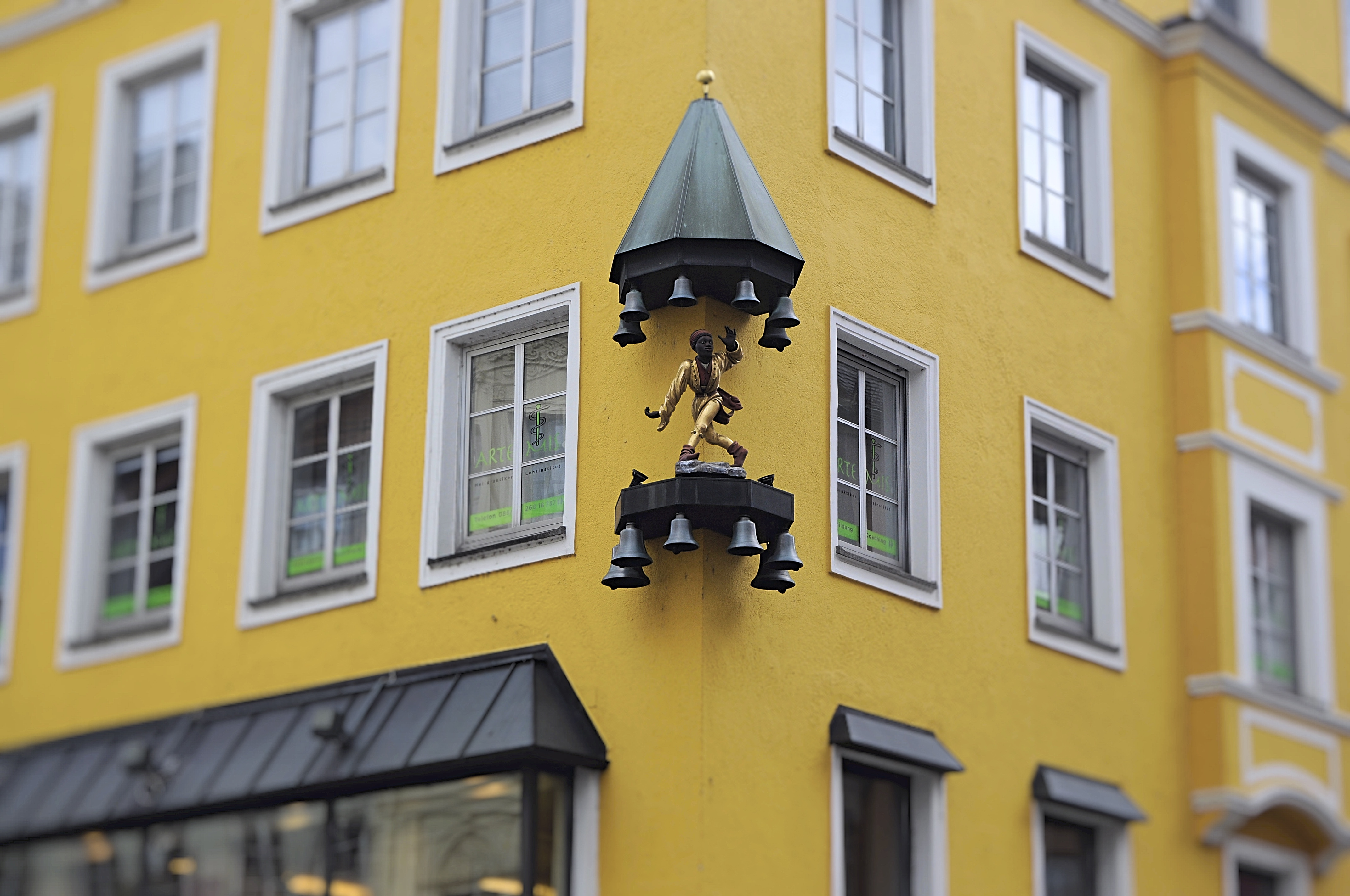 Glockenspiel eines Moriskentänzers über dem Juwelier Fridrich (J. B. Fridrich GmbH & Co. KG) in München.